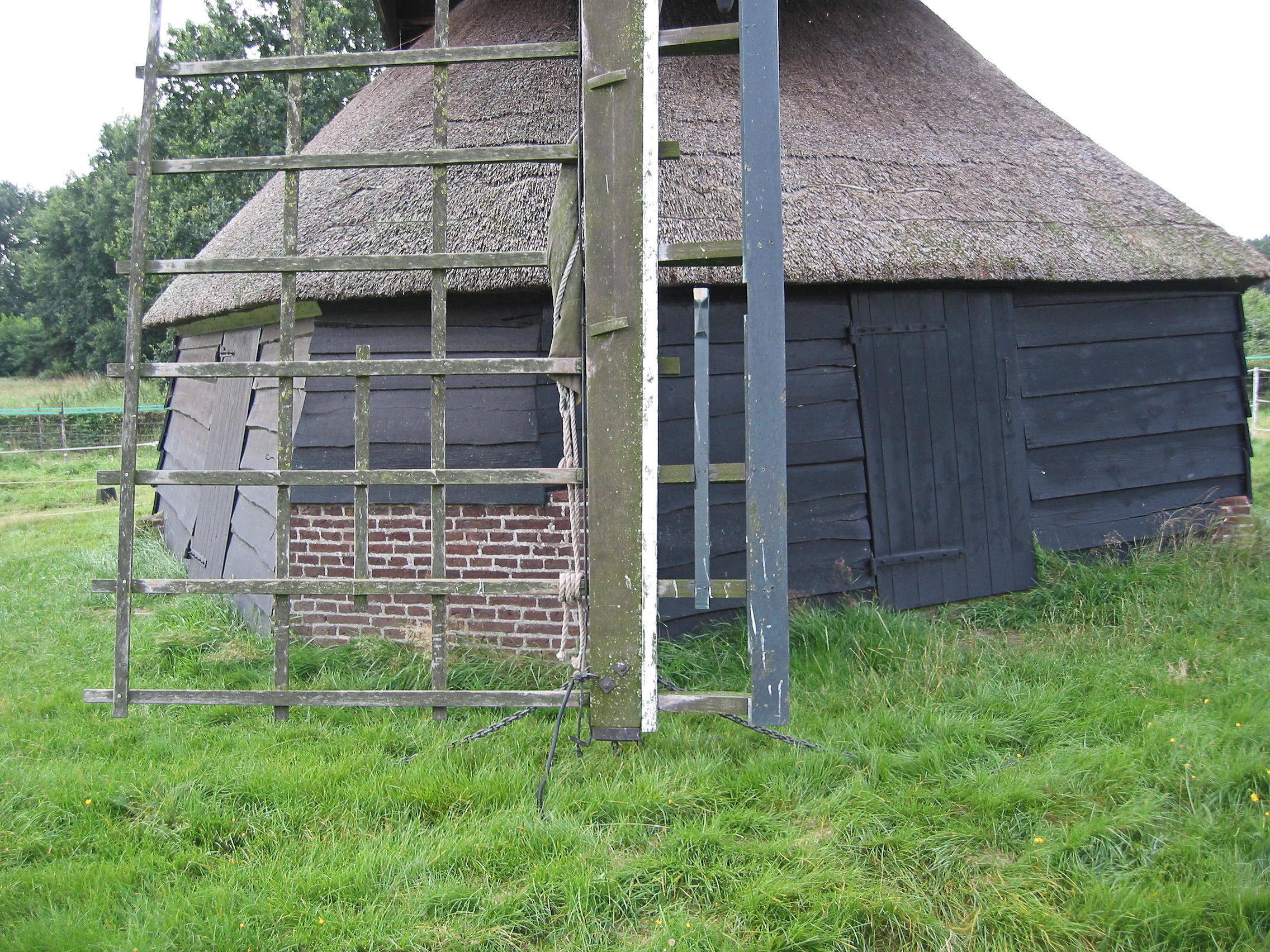 Voet met wiek van Doesburgermolen te Ede 11 augustus 2007